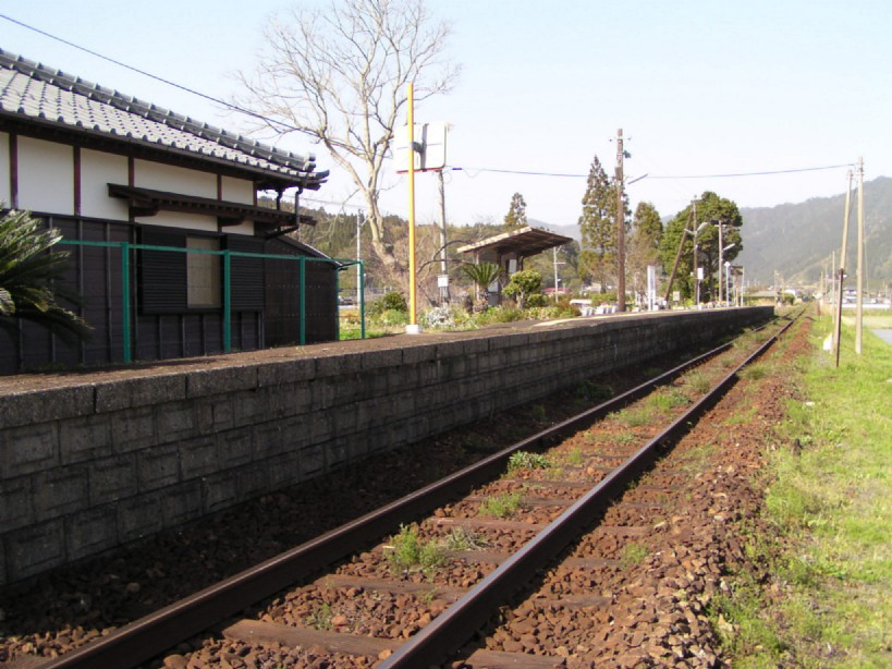 2005年3月30日に投稿者が内之田駅にて撮影。